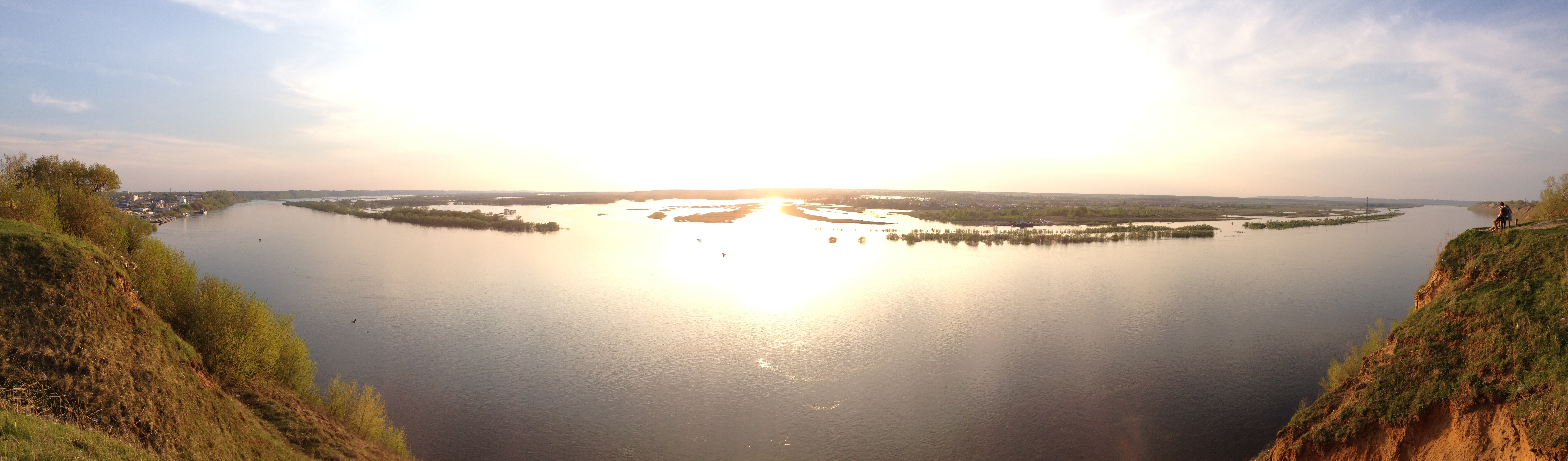 Вид с Троицкой горы на весенний разлив реки Оки. Затопленные луга.